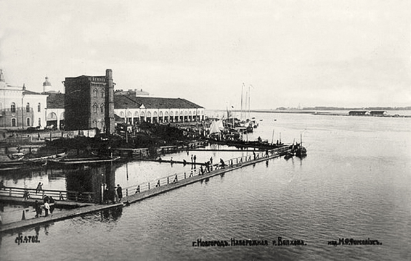 Водонапорная башня "Владимирского" водопровода в г. Новгороде